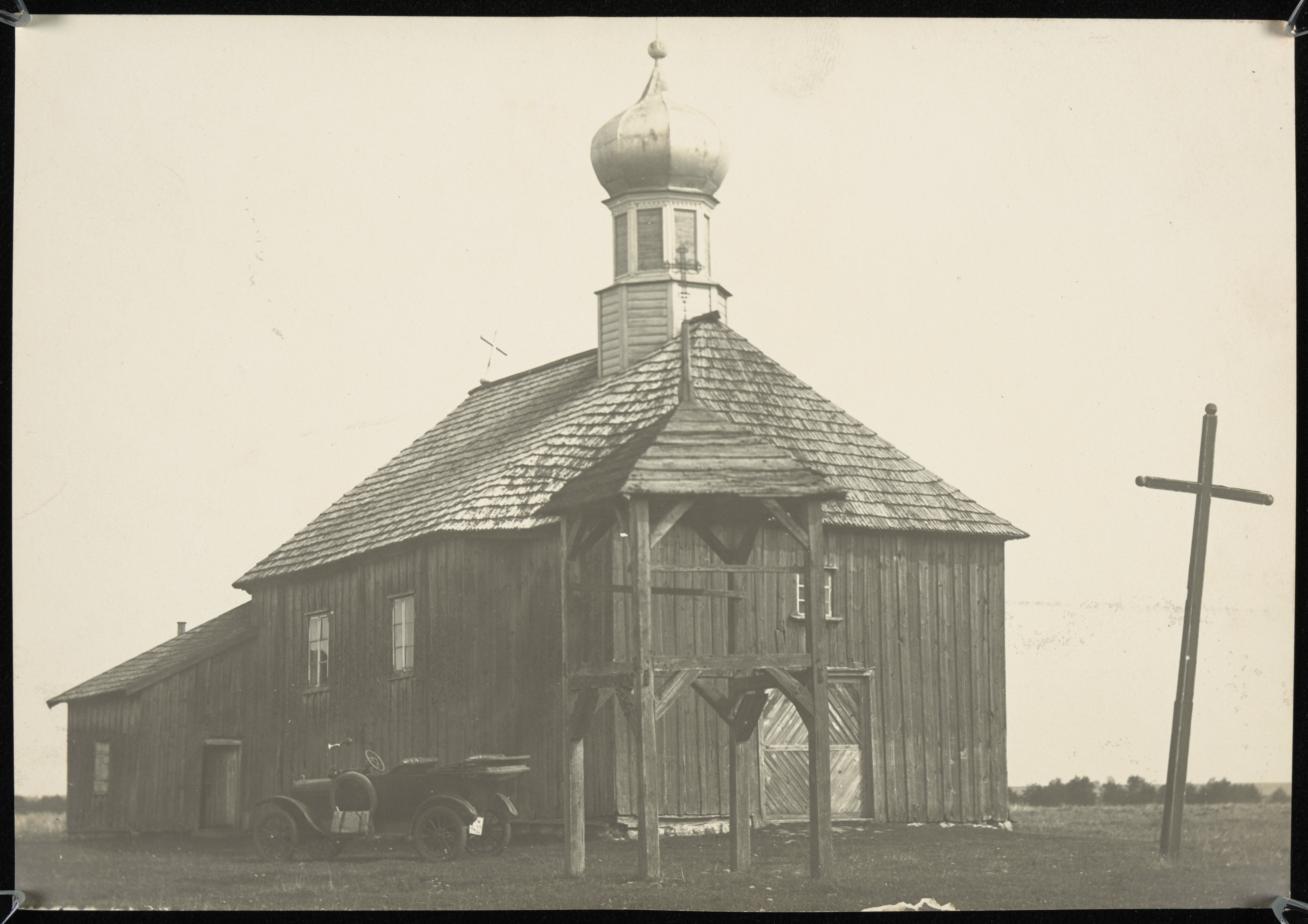 Беларуская (тарашкевіца): Крывічы (Kryvičy) каля Беліцы (Bielica). Царква